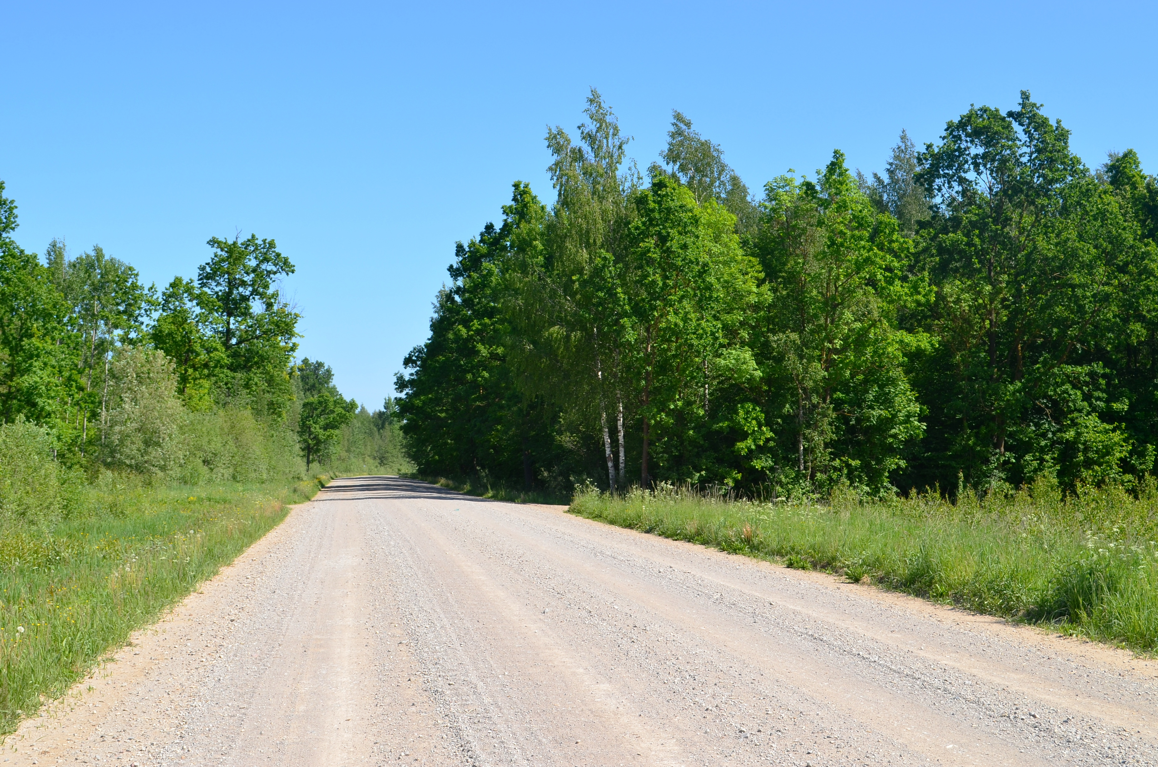 Paežerių miškas prie Kolyčių, Pakruojo raj.